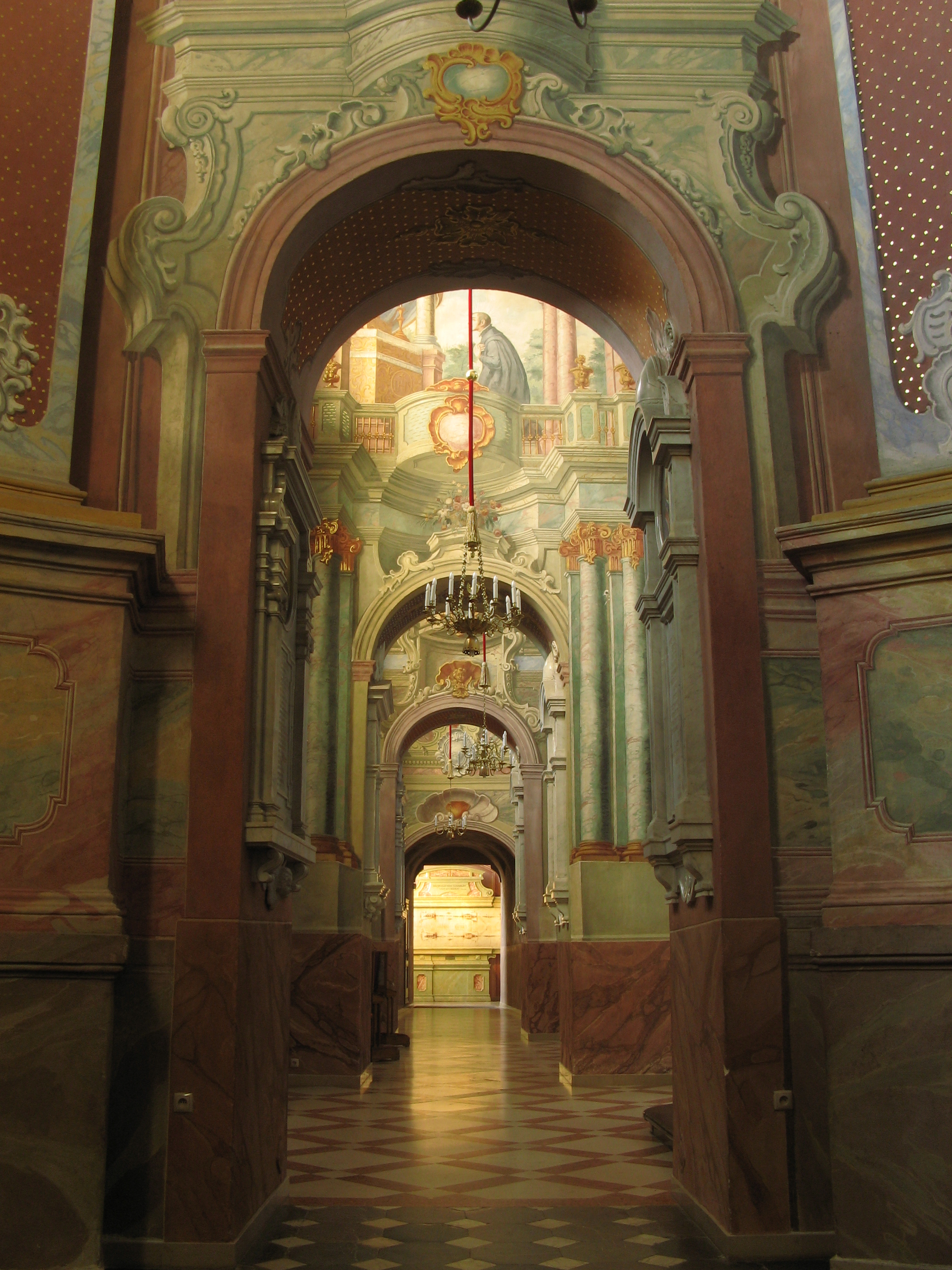 Wnętrze bazyliki archikatedralnej w Lublinie